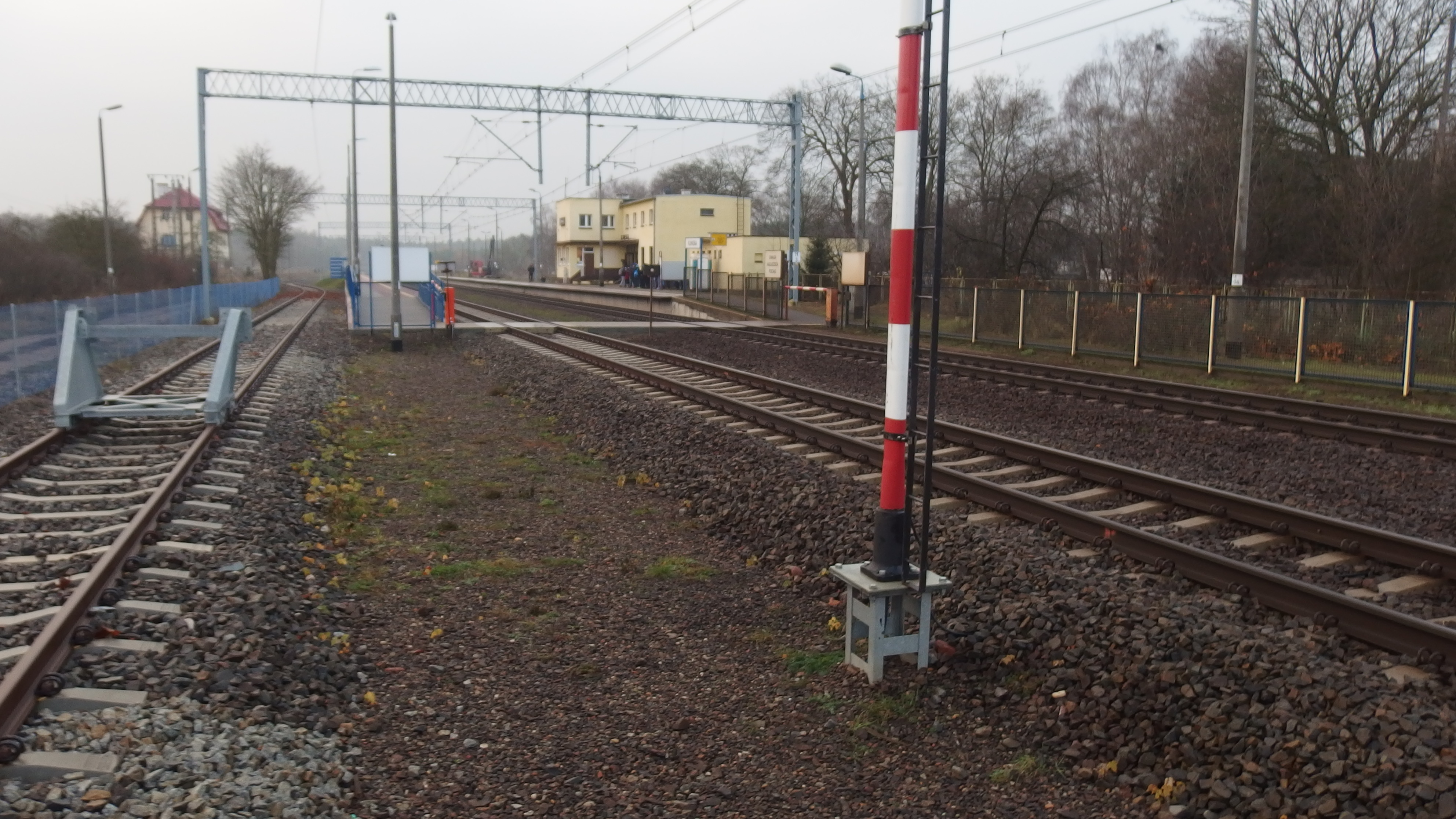 Stacja kolejowa Kliniska